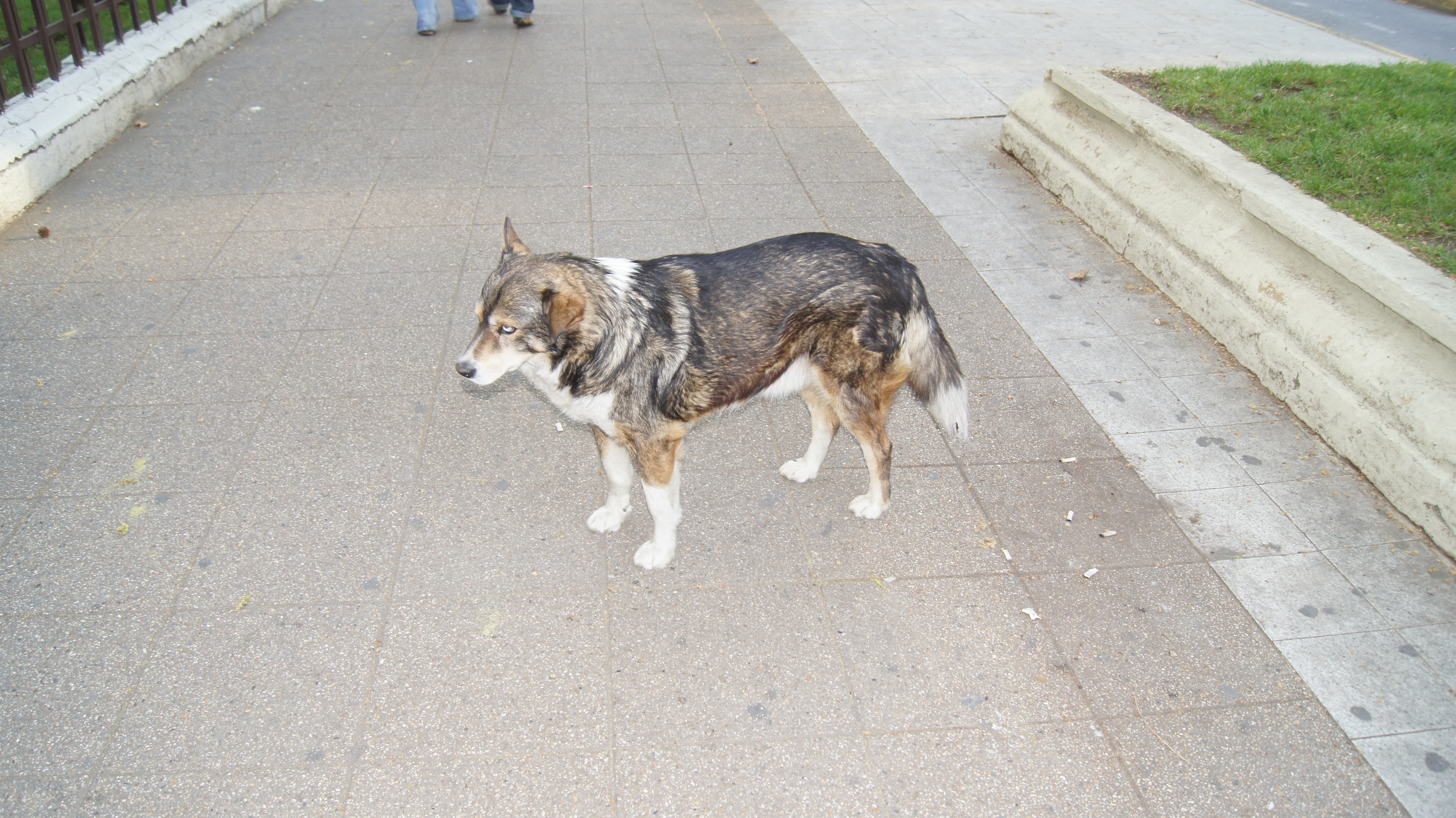 perro callejero